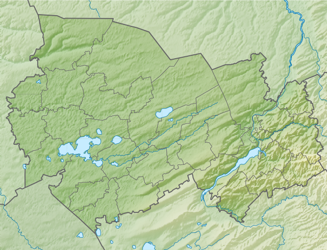 Физическая карта Новосибирской области.